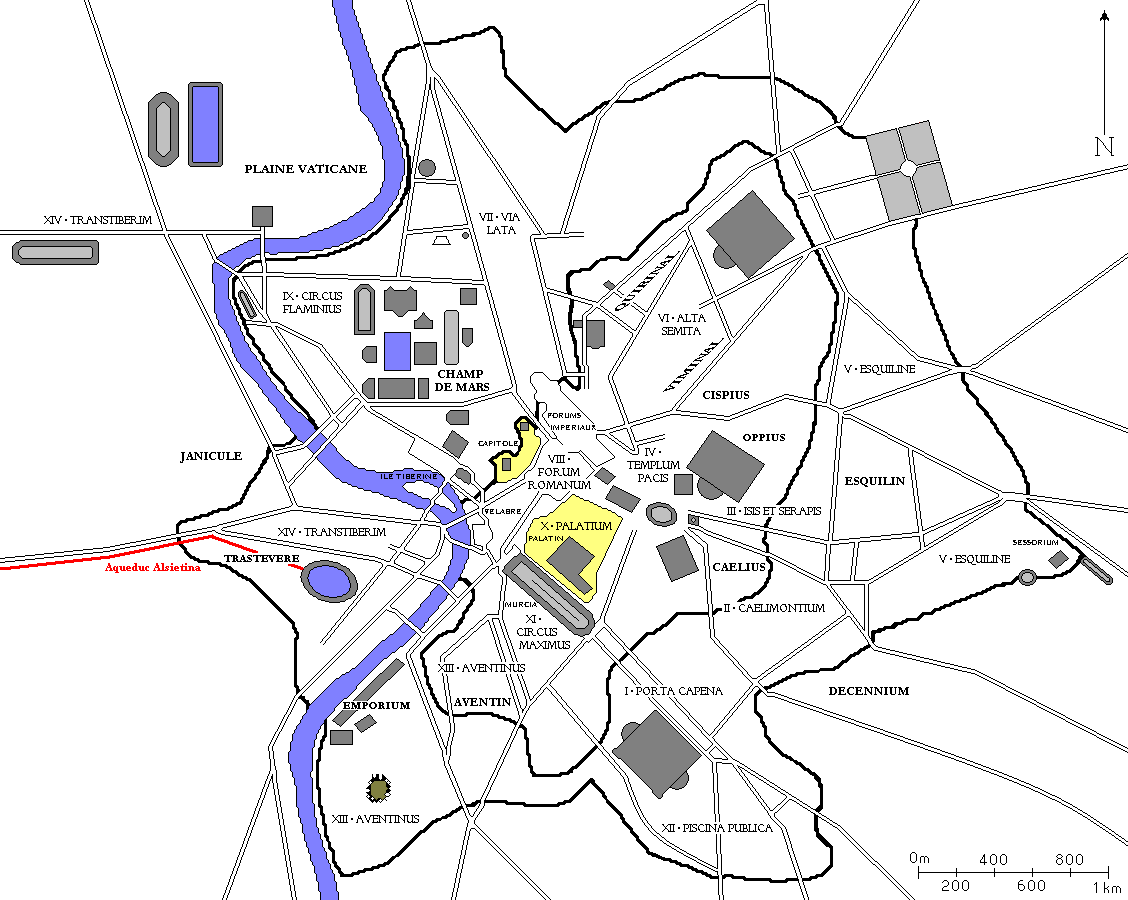 Plan de Rome avec l'Aqua Alsietina en rouge.